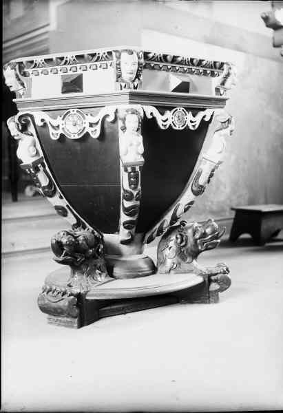 Dopfunt, snabbinv. Kommer från gamla kyrkan, riven 1900. Kategori: (04) DopfuntarDopfunt, snabbinv. Kommer från gamla kyrkan, riven 1900.